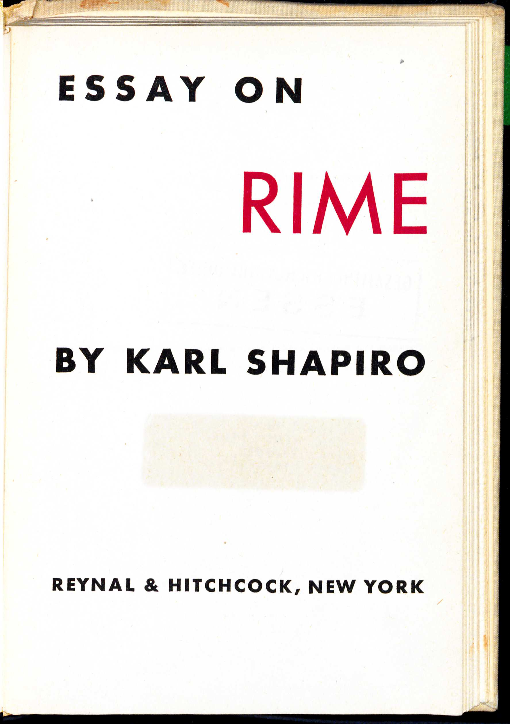 Karl Shapiro: Essay on Rime. New York : Reynal & Hitchcock, 1945